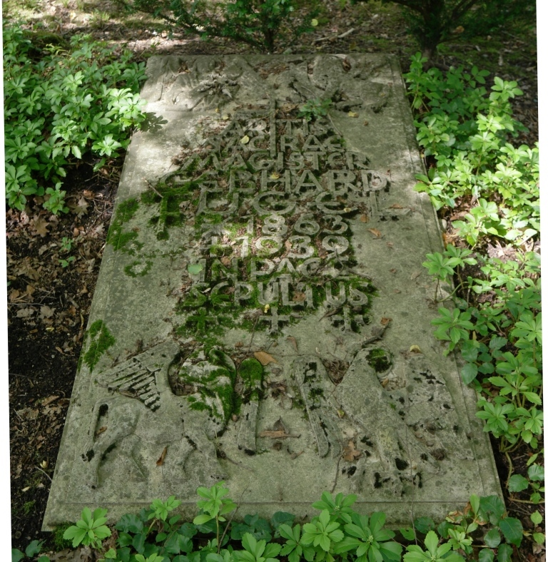 Grab des Malers Gebhard Fugel, 1863-1939, auf dem Waldfriedhof in München-Solln